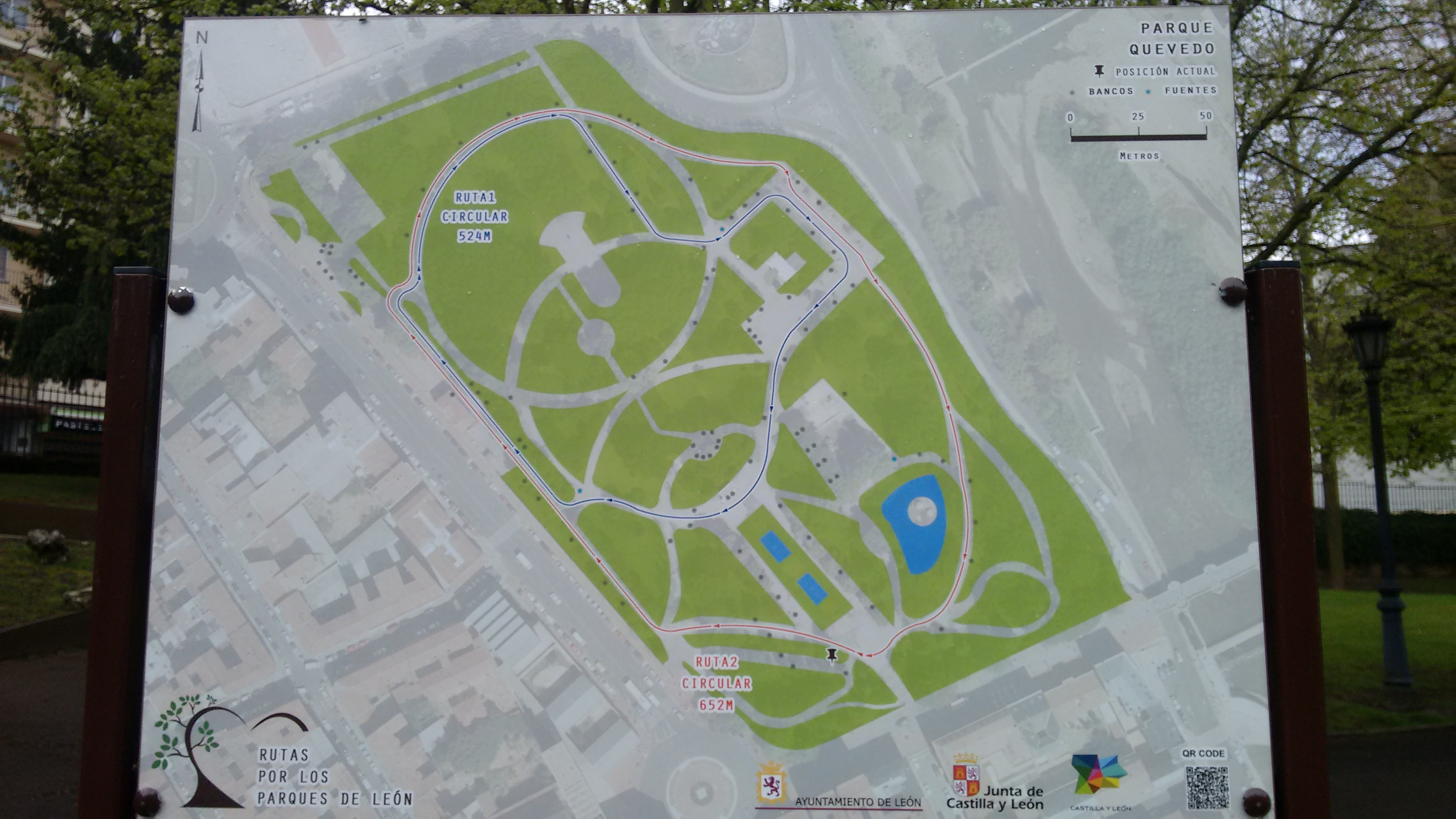 Cartel colocado dentro de la actuación llevada a cabo en 2019, donde se detallan dos rutas circulares de 524 y 652 m. y donde se simbolizan la ubicación de bancos y fuentes del parque.